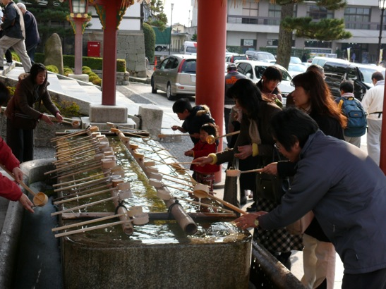 O-harai, purification rituelle. image sur commons.